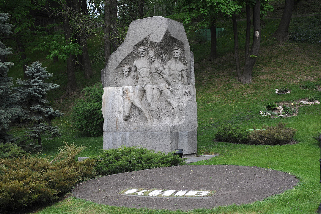 Мемориал на Стадионе Динамо